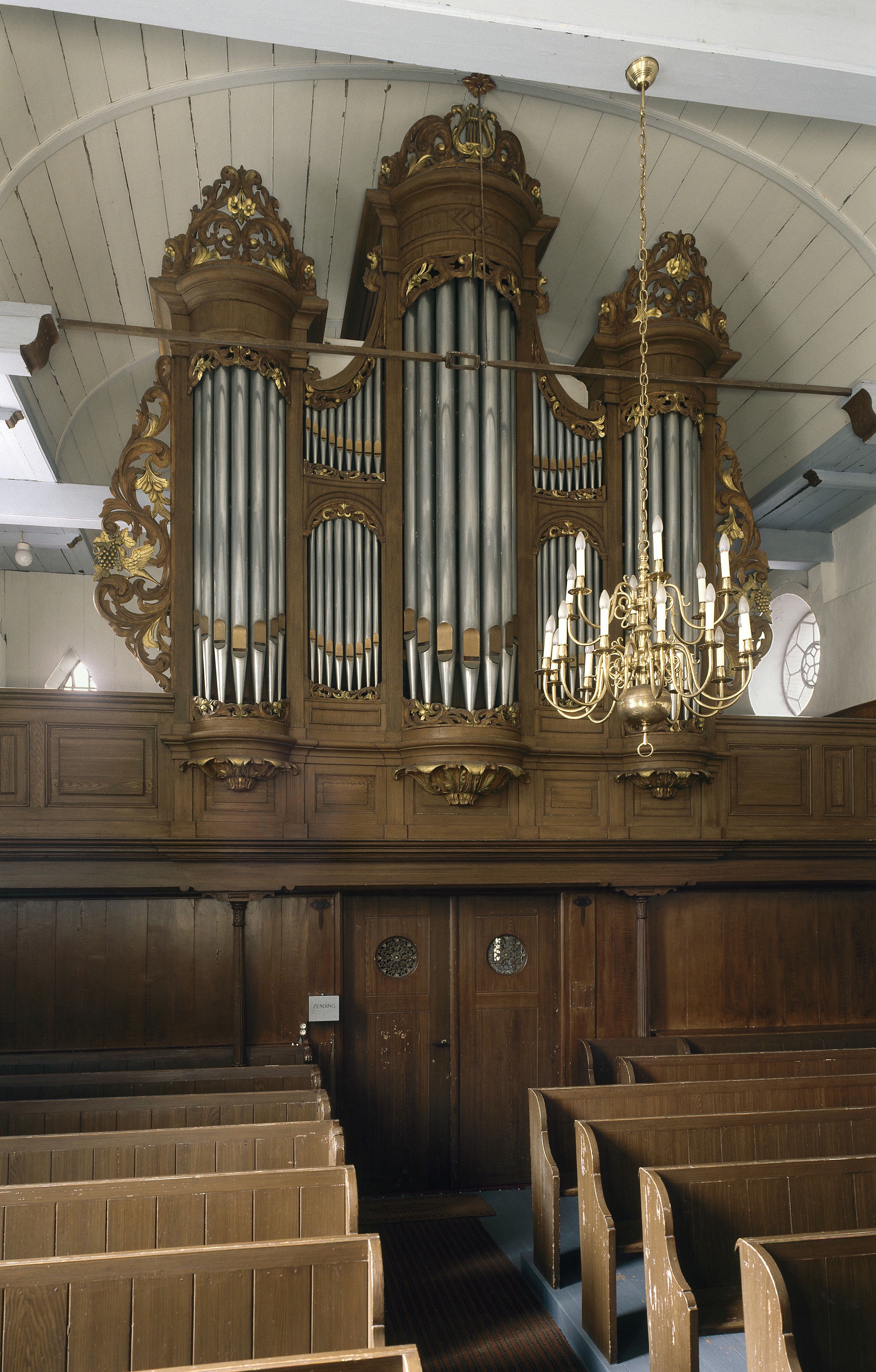 Nederlands Hervormde Kerk: Interieur, aanzicht orgel, orgelnummer 1646 (opmerking: Gefotografeerd voor Het Historische Orgel in Nederland 1878-1886, Bladzijde 144)